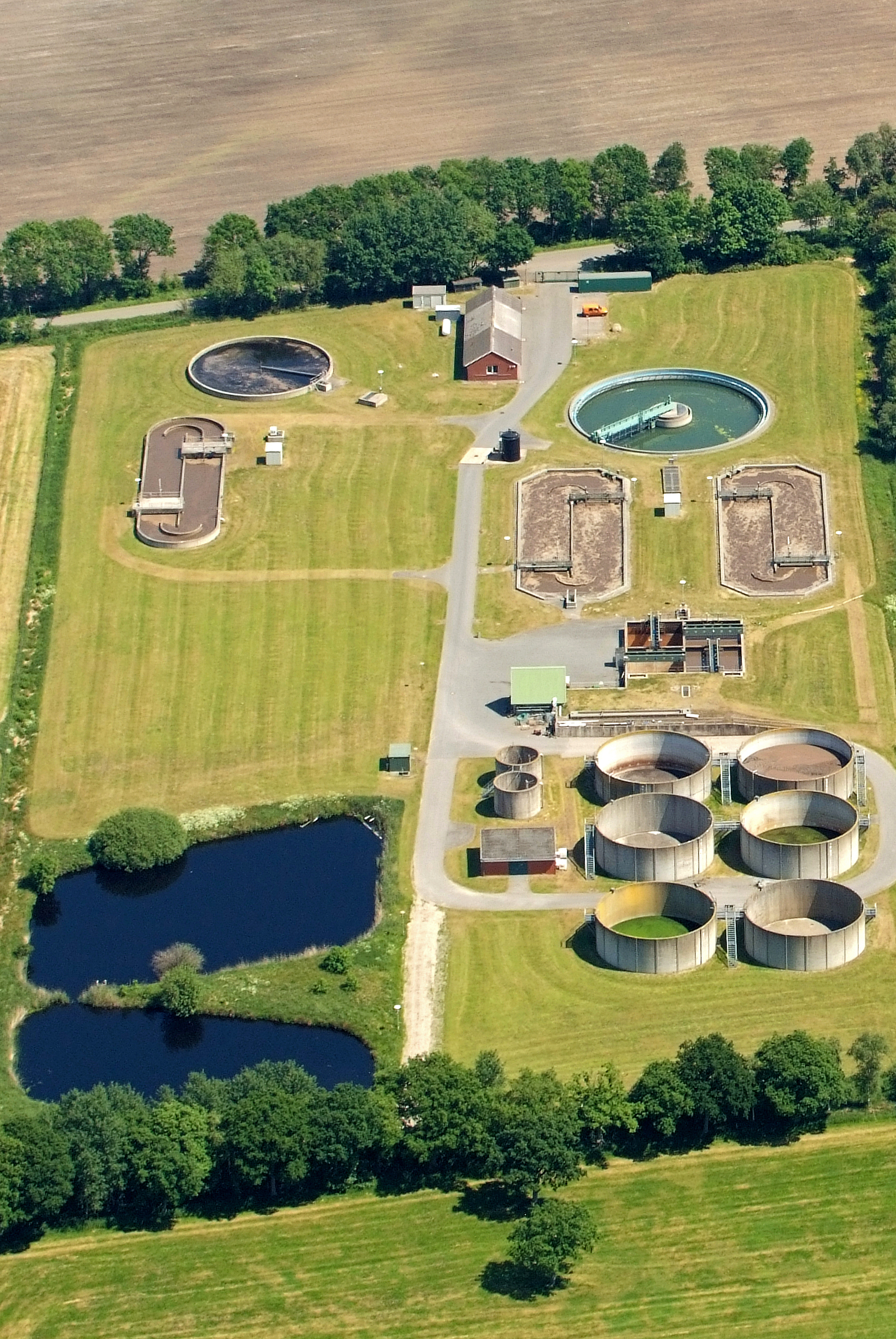 Wasseraufbereitungsanlage in Schiffdorf (Fotoflug vom Flugplatz Nordholz-Spieka über Cuxhaven und Wilhelmshaven)